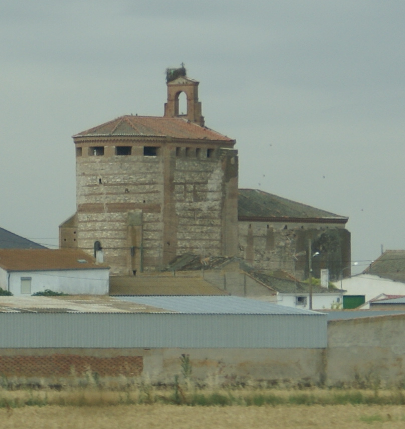 Iglesia de Tolocirio, Segovia.